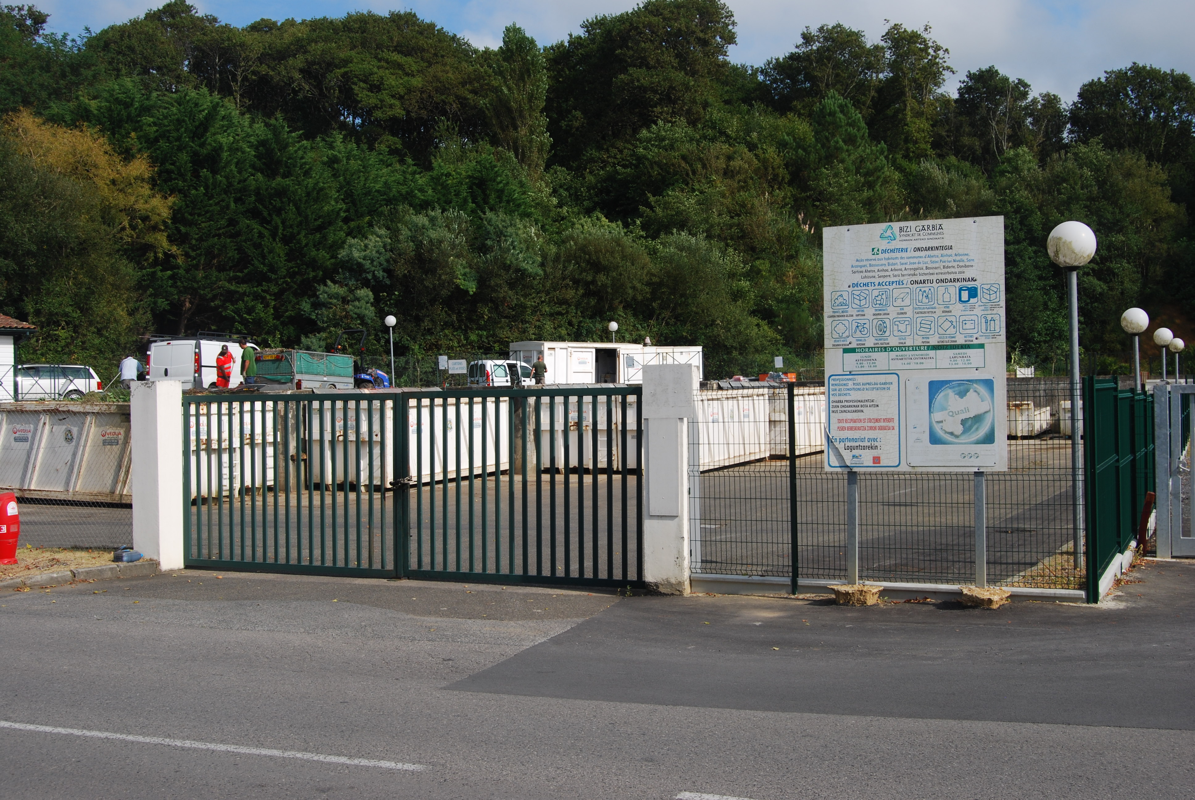 Déchetterie de Bidart.